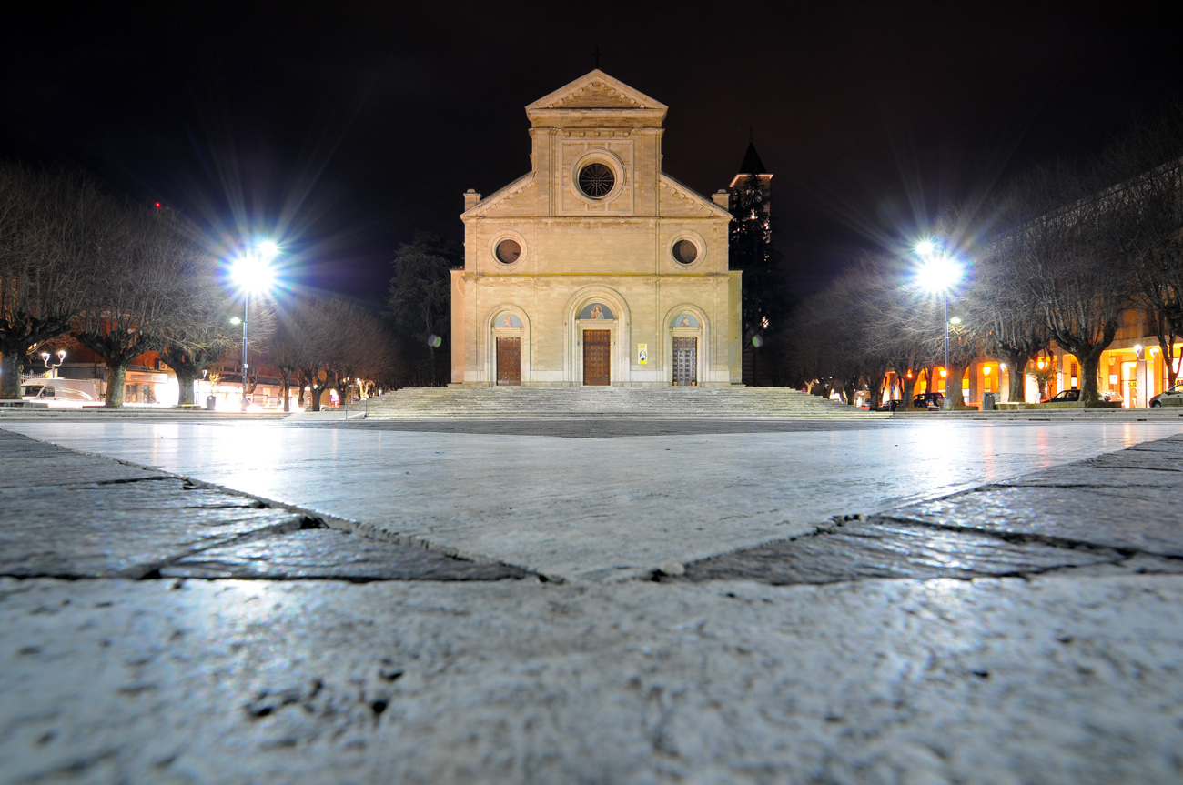 Avezzano